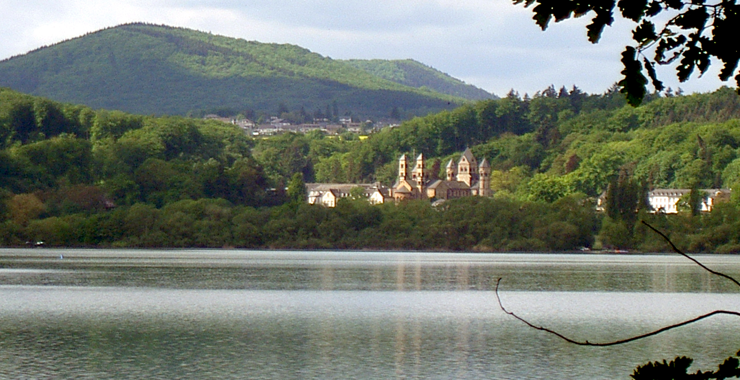 Laacher Séi.